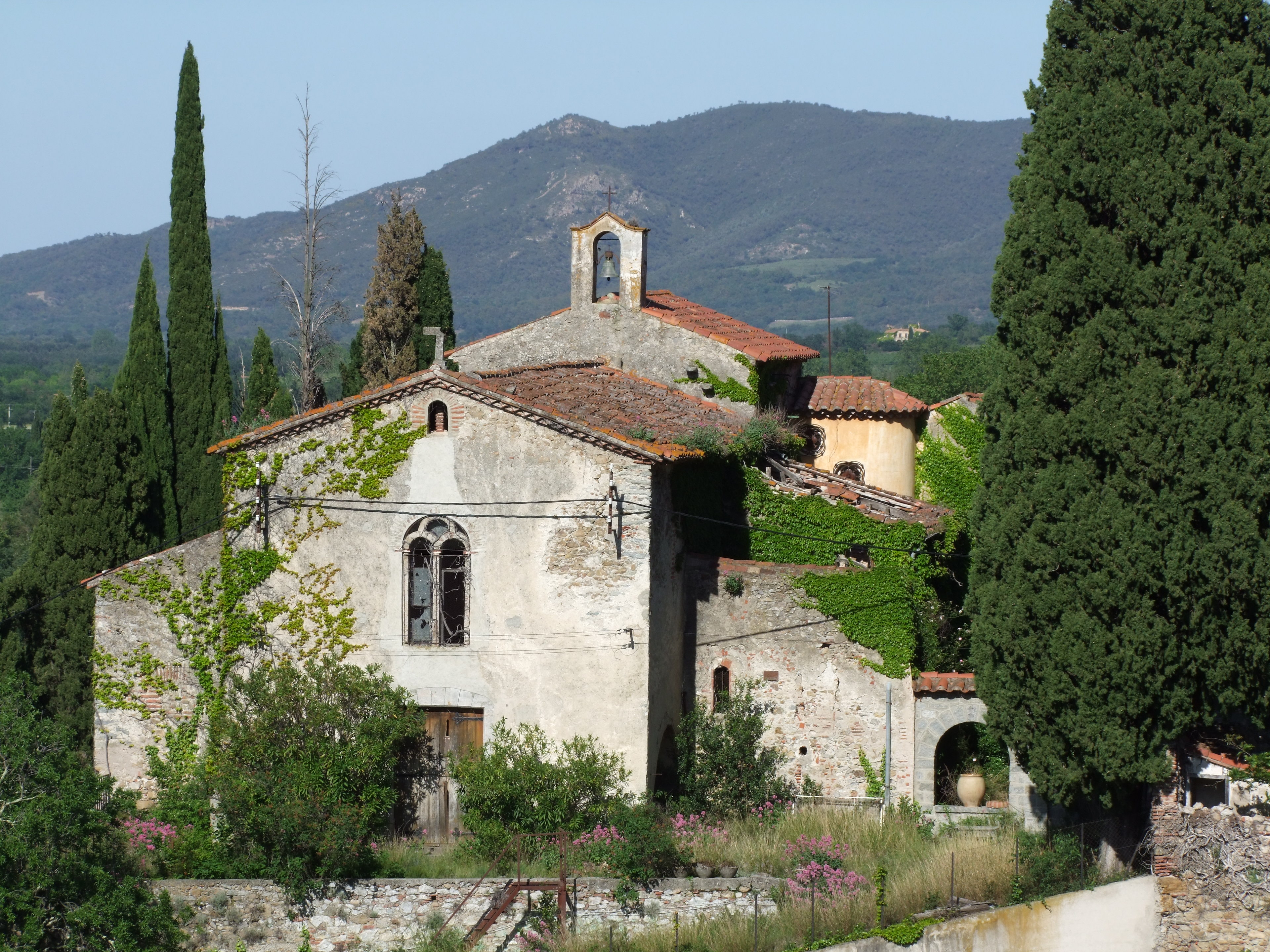 La chapelle de l'ancien couvent des Capucins n'a guère changé d'aspect depuis 1 siècle, et constitue encore quasiment la seule relique architecturale reconnaissable du couvent, malgré sa désacralisation et son appartenance à une propriété privée. Son chevet-tour coiffé de son clocheton fait partie d'une autre propriété également privée et est converti en habitation depuis le milieu des années 1930.